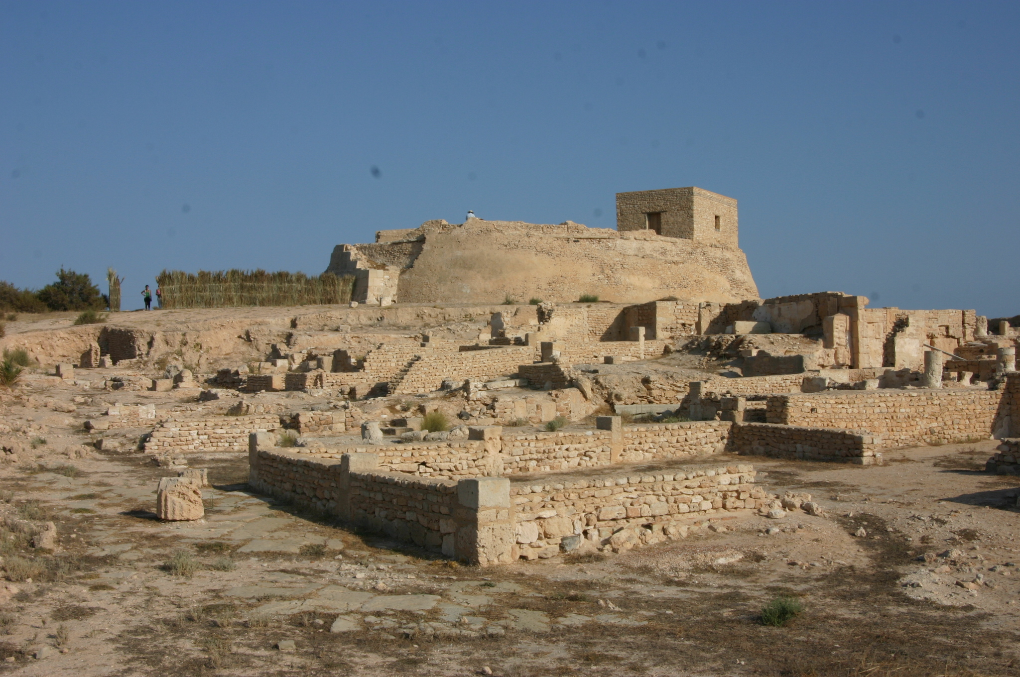 Photo perso représentant le champ de fouilles de Bordj Hassar à Kerkennah (août 2007).